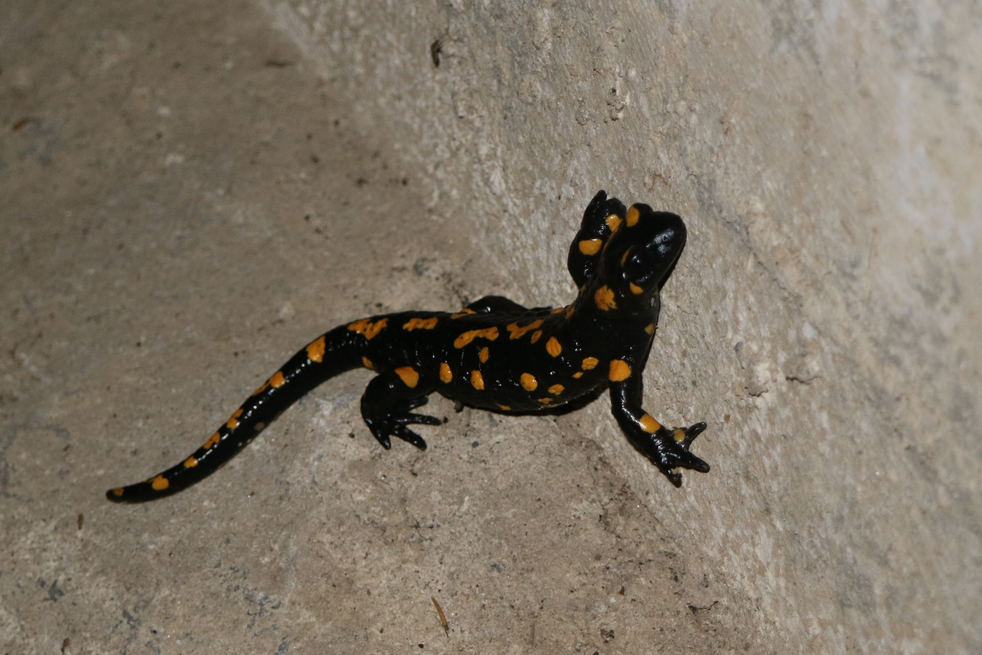 Feuersalamander (Salamandra salamandra) im Kaiserwald bei Graz